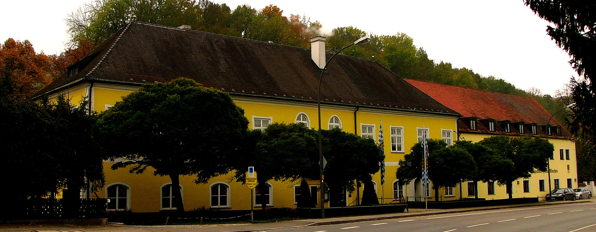 Ehem. Schloss SchönbrunnThis is a photograph of an architectural monument.